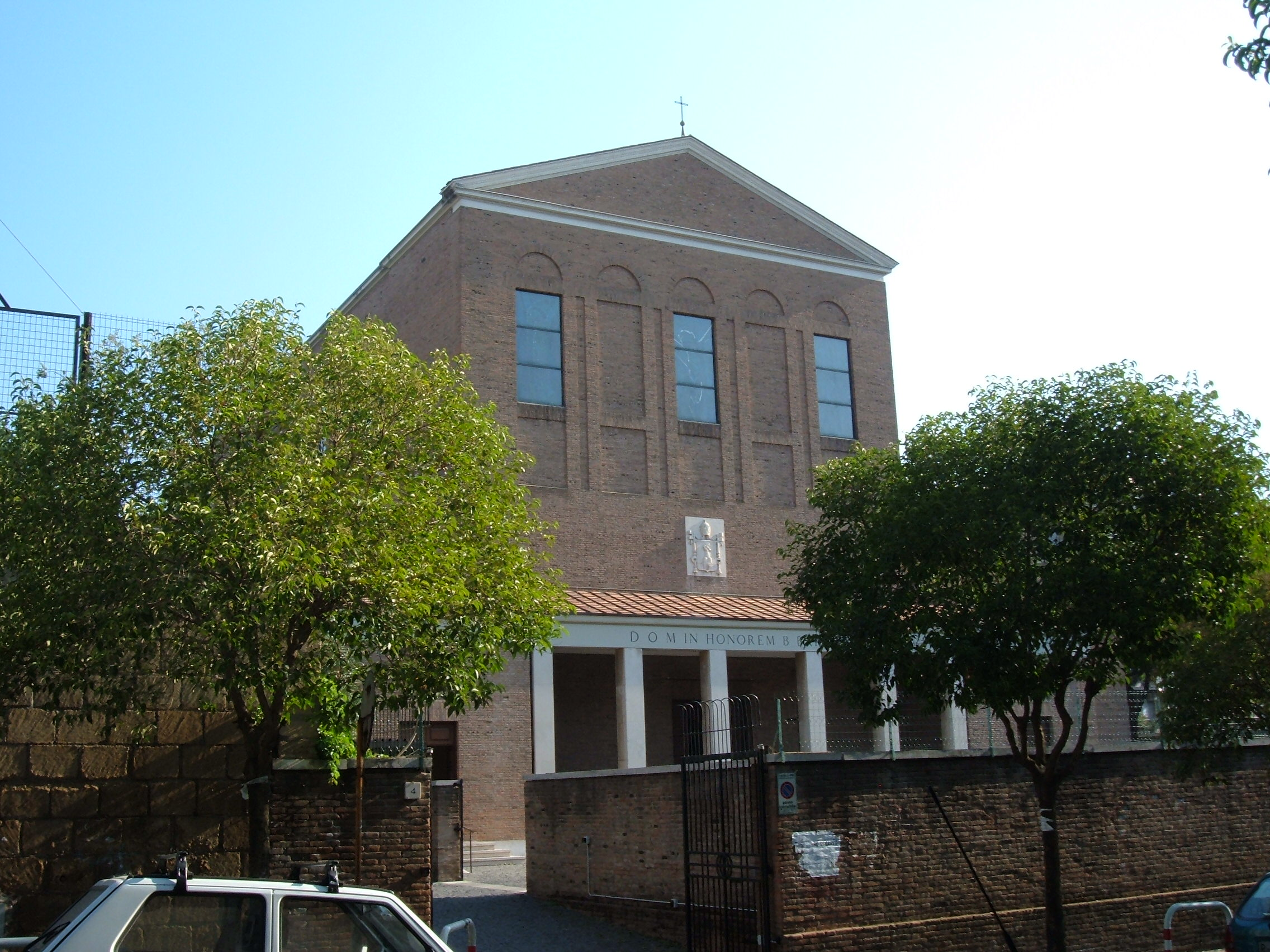 Chiesa di San Barnaba apostolo, a Roma, nel quartiere Prenestino-Labicano.